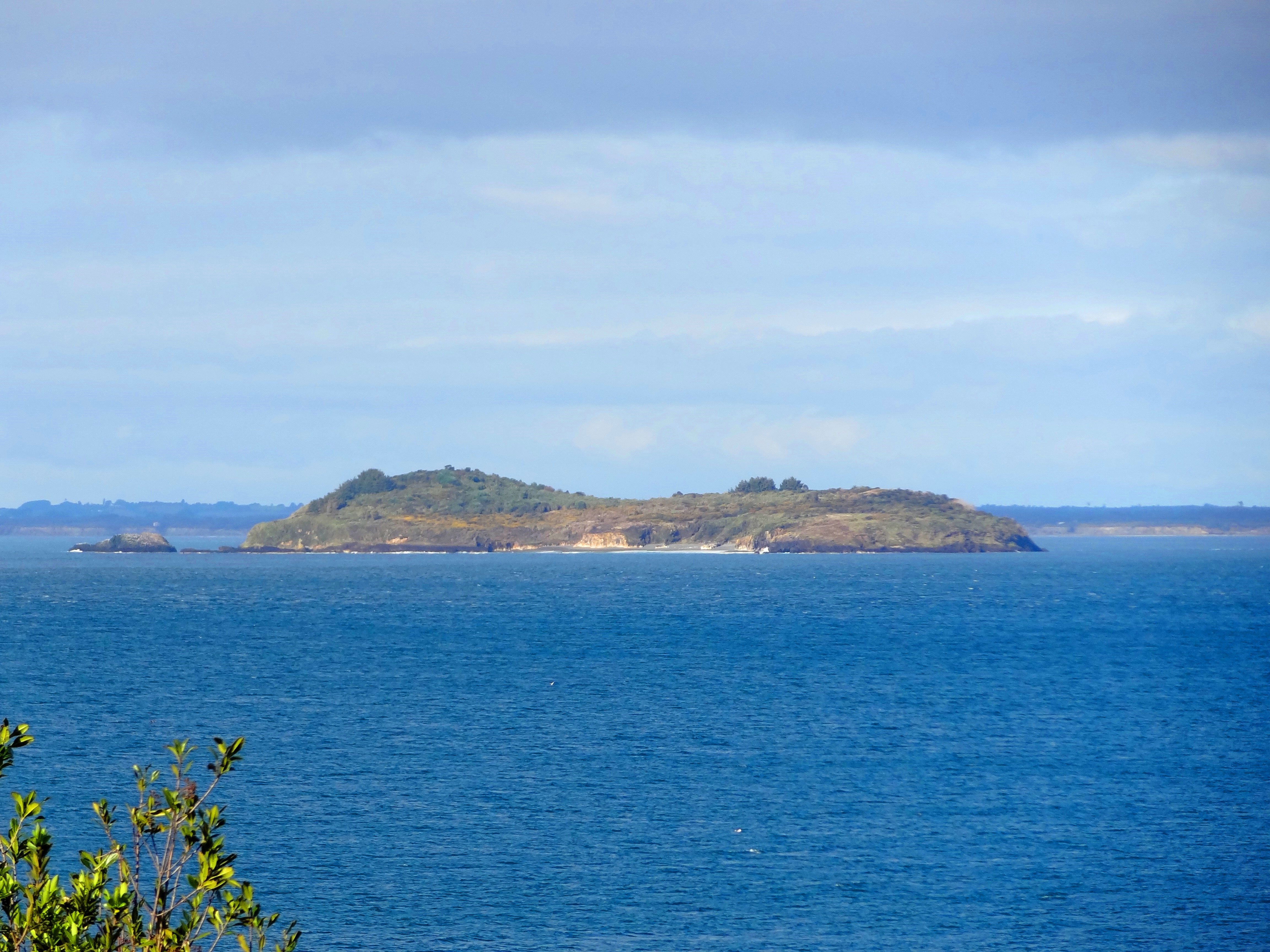 Fuerte de Chaicura. Vista desde la Batería de Artillería Chaicura, se encuentra la Isla Cochinos que es un conjunto de rocas muchas de las cuales, según la marea, no son visibles y además de poner a prueba la pericia de los capitanes son una barrera y defensa en la entrada de la bahía de Ancud.